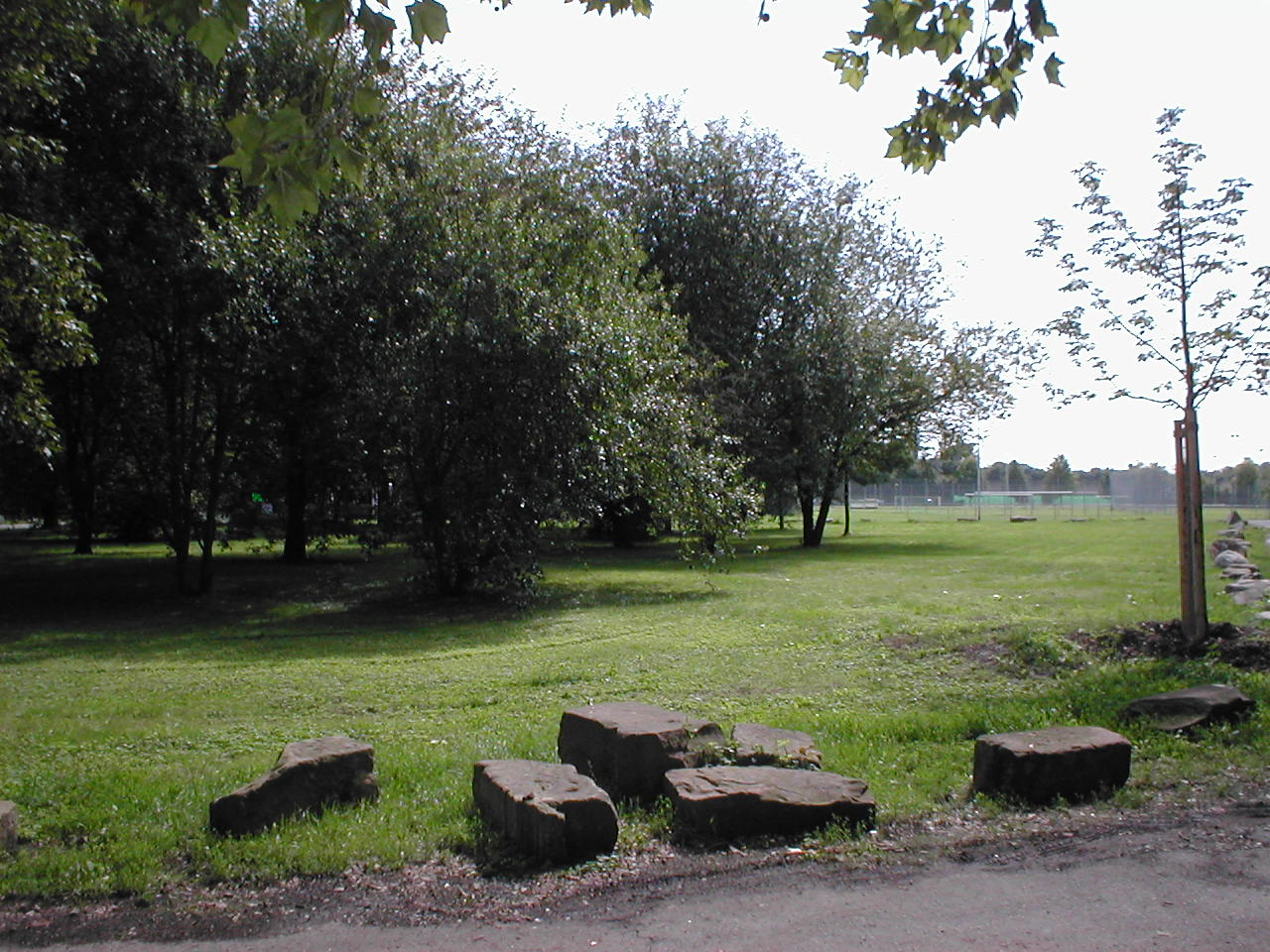 Gelände des Böckinger Sees (bis 1948), im Vordergrund Kriegstrümmer.